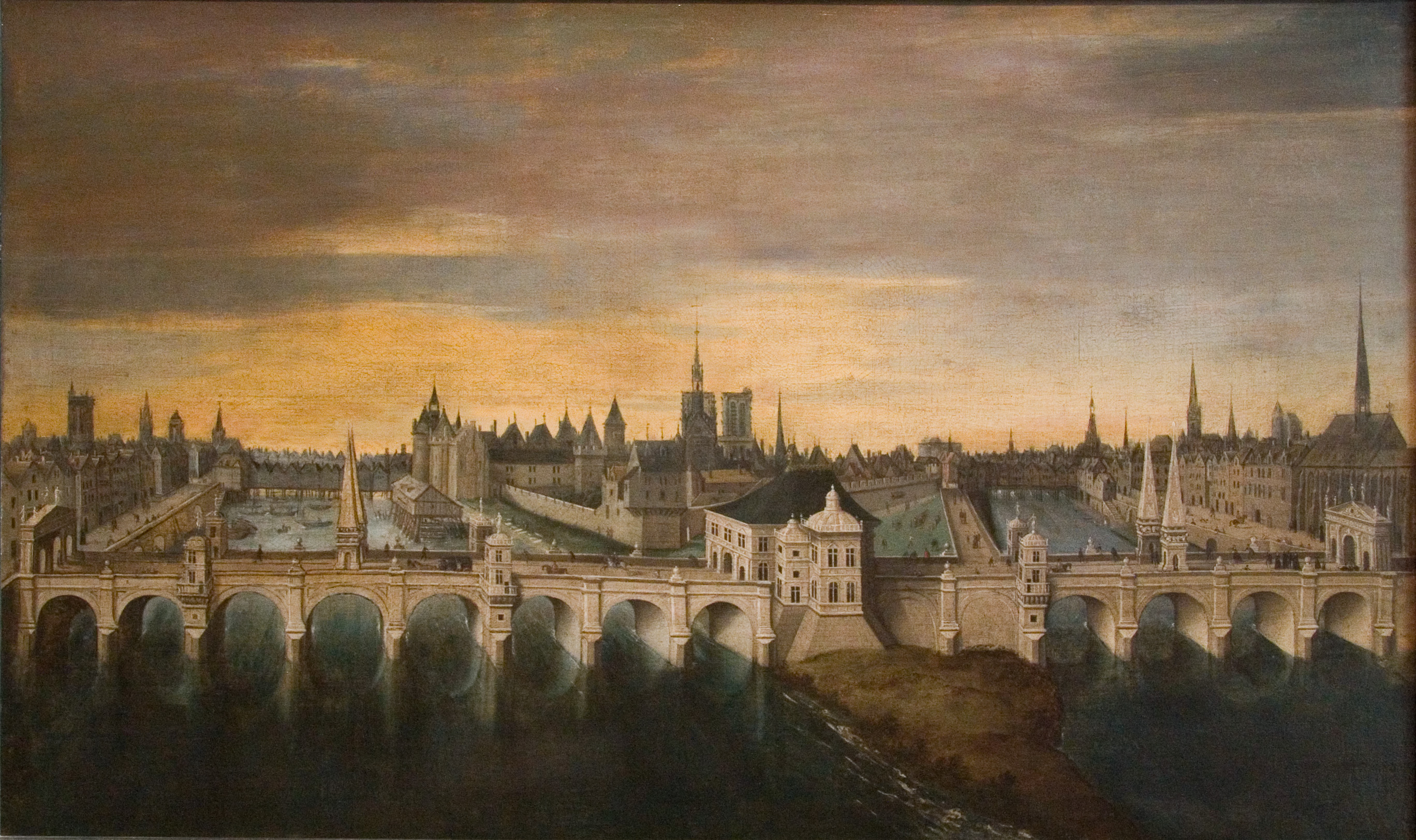 Projet pour le Pont-Neuf